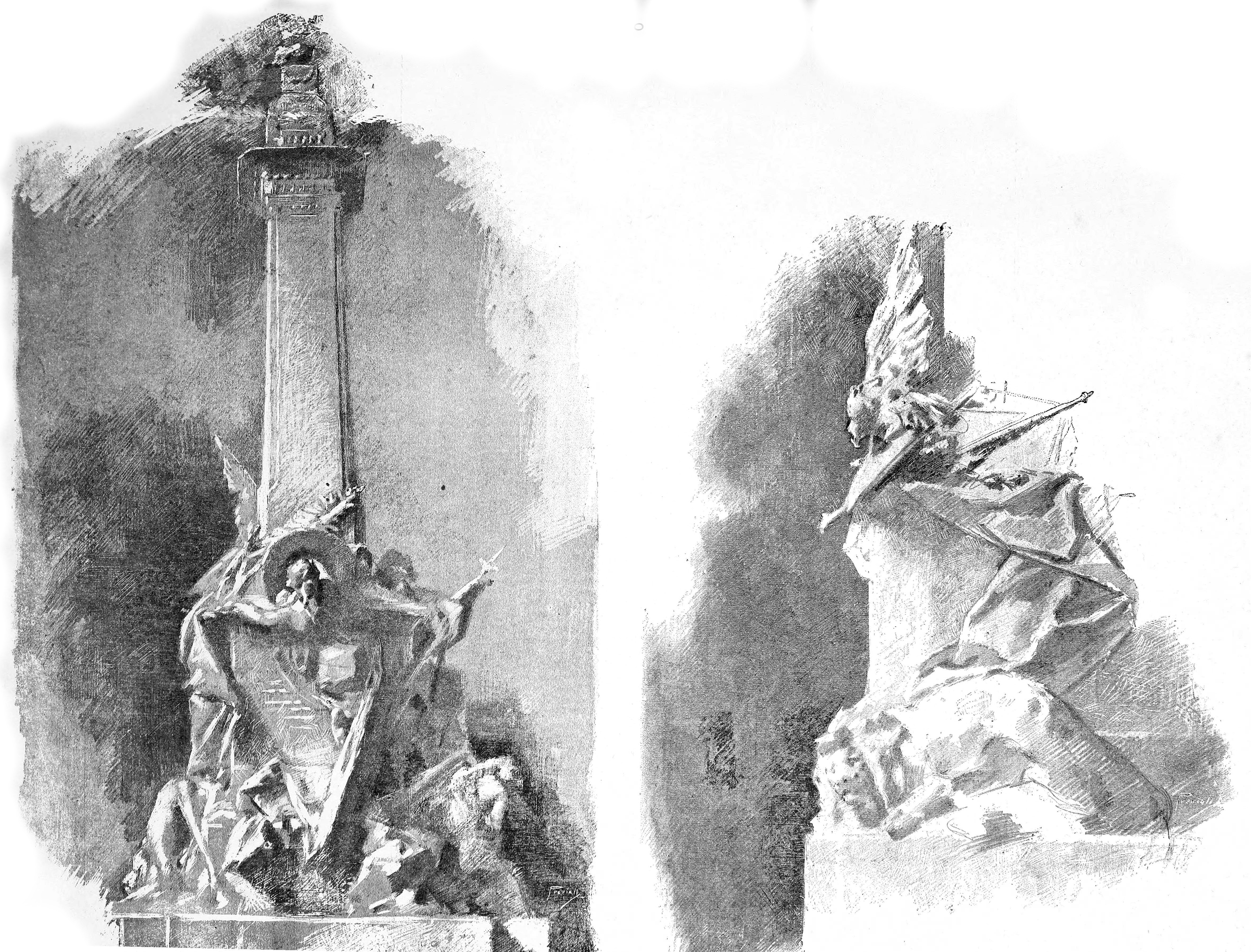 Bozzetto del monumento alle Cinque Giornate